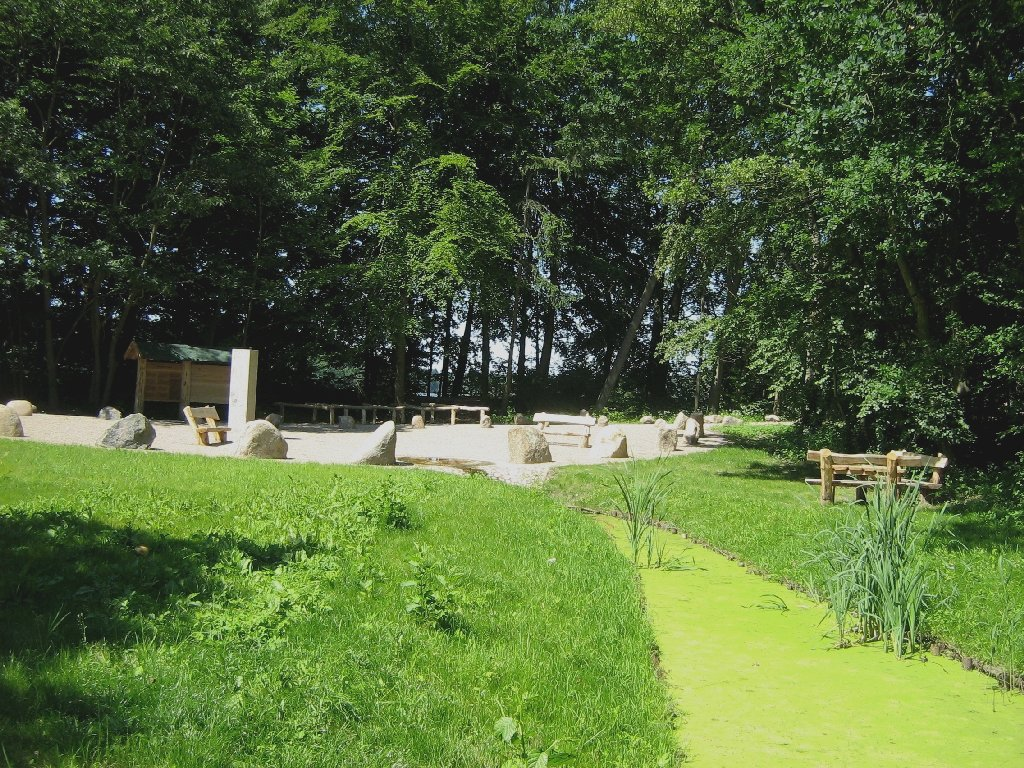 Das Diekenbruch, die Quelle des Flusses Havel in der Mecklenburgische Seenplatte (Landkreis Mecklenburgische Seenplatte, Mecklenburg-Vorpommern, Germany).